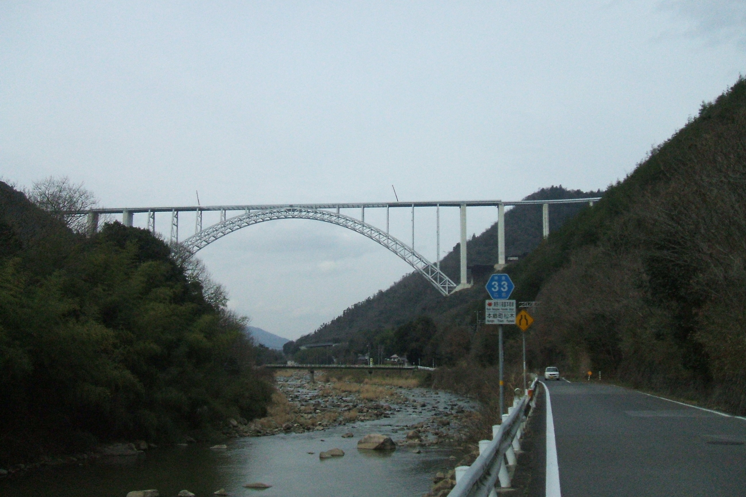 広島県東広島市河内町の広島県道33号線から建設中の仮称「空港大橋」を仰ぎ見た光景。